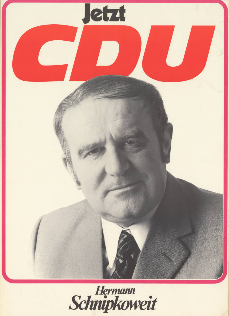 Jetzt CDU Hermann SchnipkoweitAbbildung:PorträtfotoPlakatart:Kandidaten-/Personenplakat mit PorträtKünstler_Grafiker:Graphic Design Broder Brodersen, HannoverAuftraggeber:CDU in NiedersachsenDrucker_Druckart_Druckort:Wiily F.P. Fehling GmbH, HannoverObjekt-Signatur:10-008 : 351Bestand:Landtagswahlplakate Niedersachsen (10-008)GliederungBestand10-18:Landtagswahlplakate Niedersachsen (10-008) » CDULizenz:KAS/ACDP 10-008 : 351 CC-BY-SA 3.0 DE